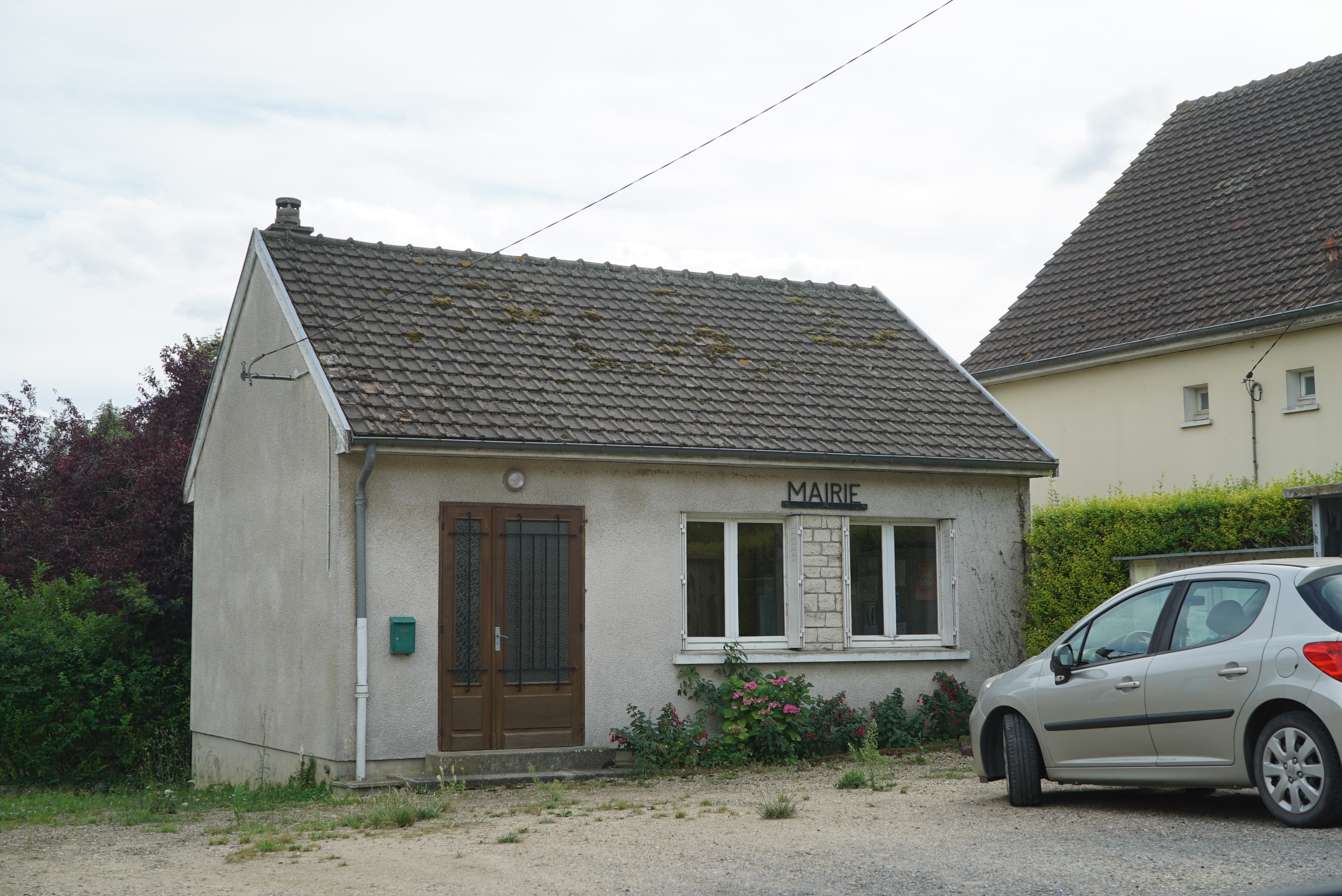 une vue du village.